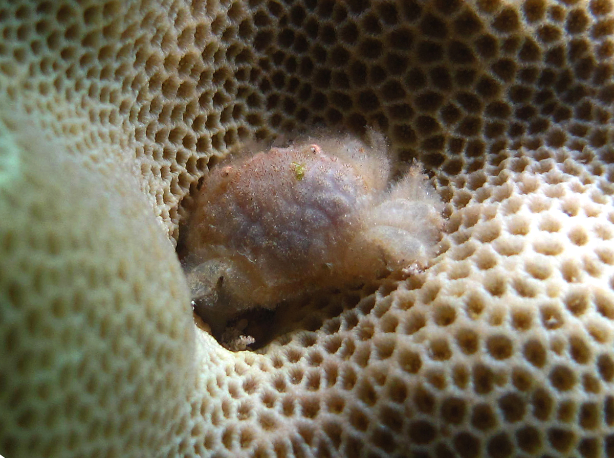 Gaillardiellus rueppelli juvénile (identification à confirmer) à la Réunion.